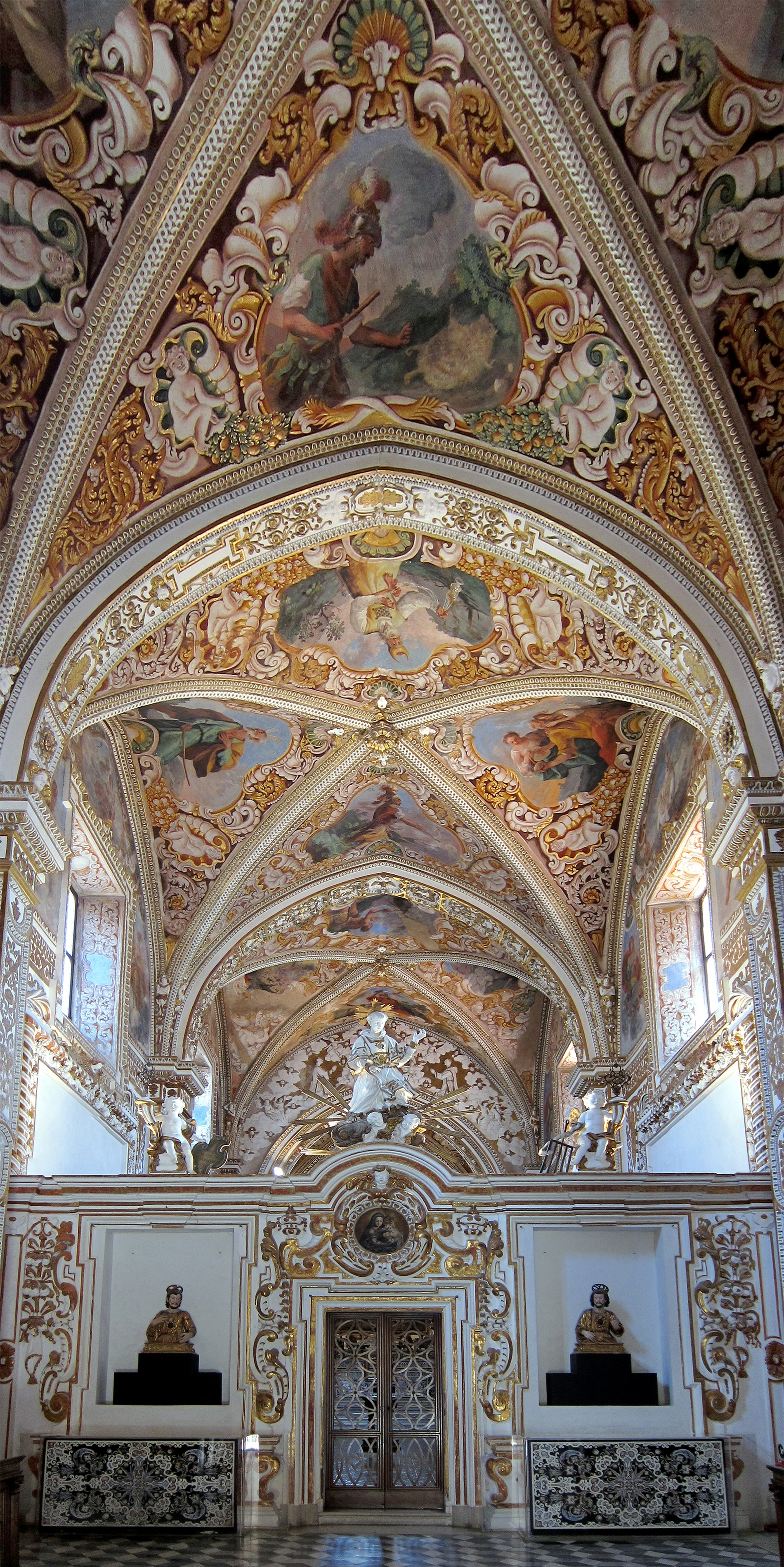 Nef de l'église de la Certosa di San Lorenzo (Padula).